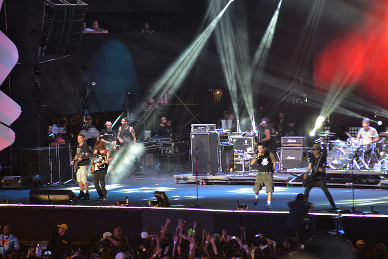 Festival de Verão 2015 (Show de Capital Inicial)